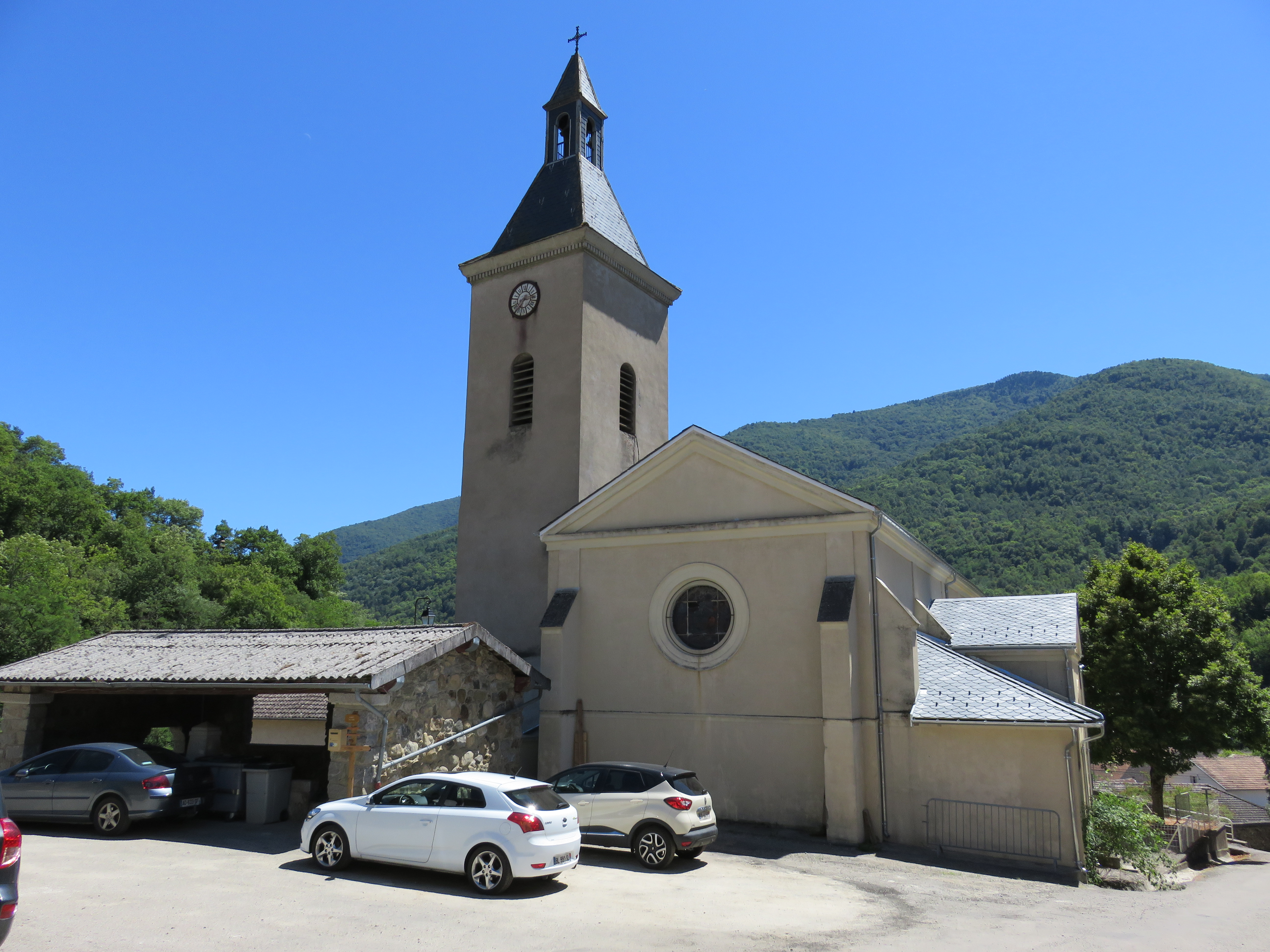 Église d'Albiès. Photo sans date incrustée.